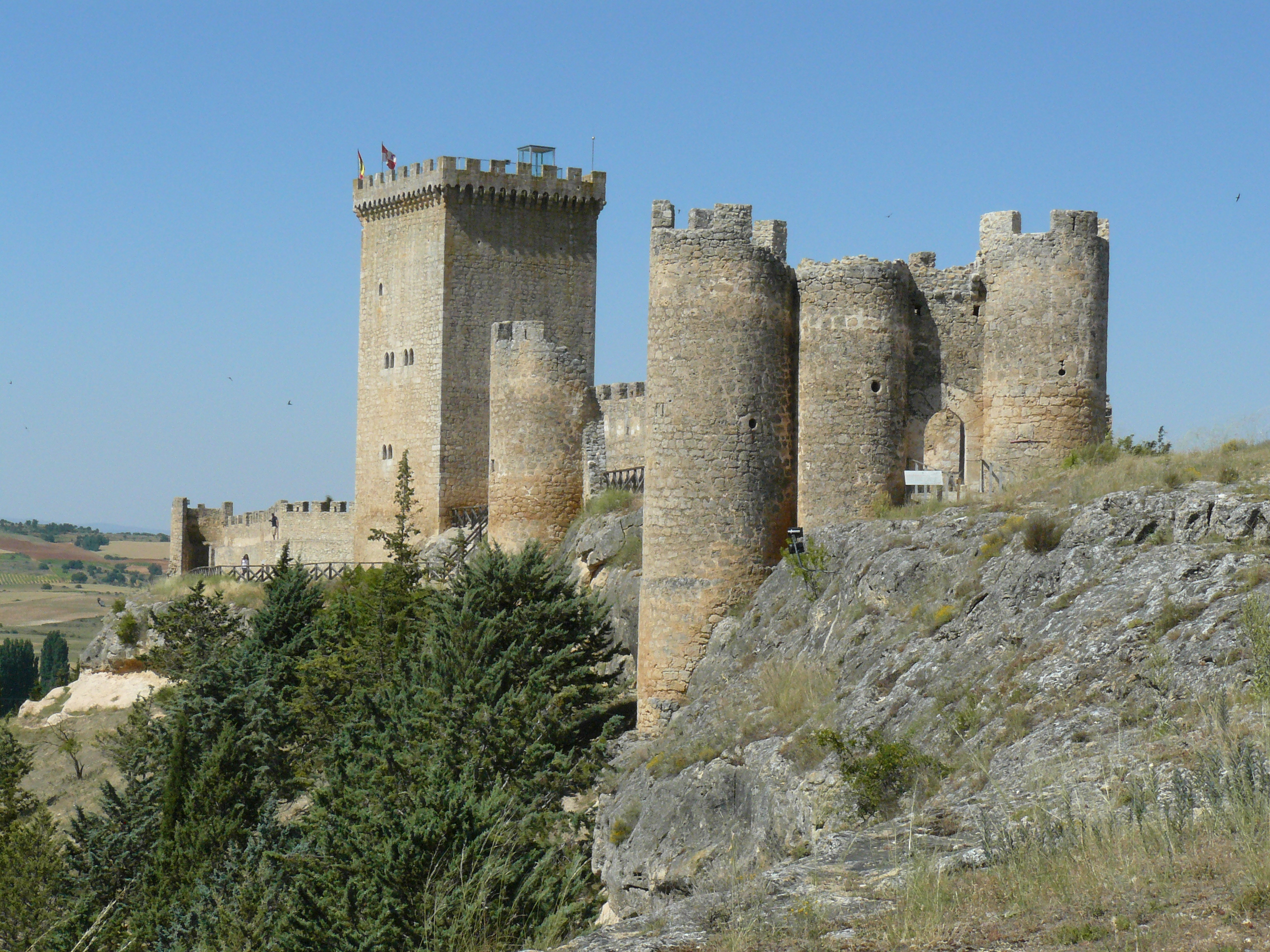 Castillo de Peñaranda de Duero, Burgos.